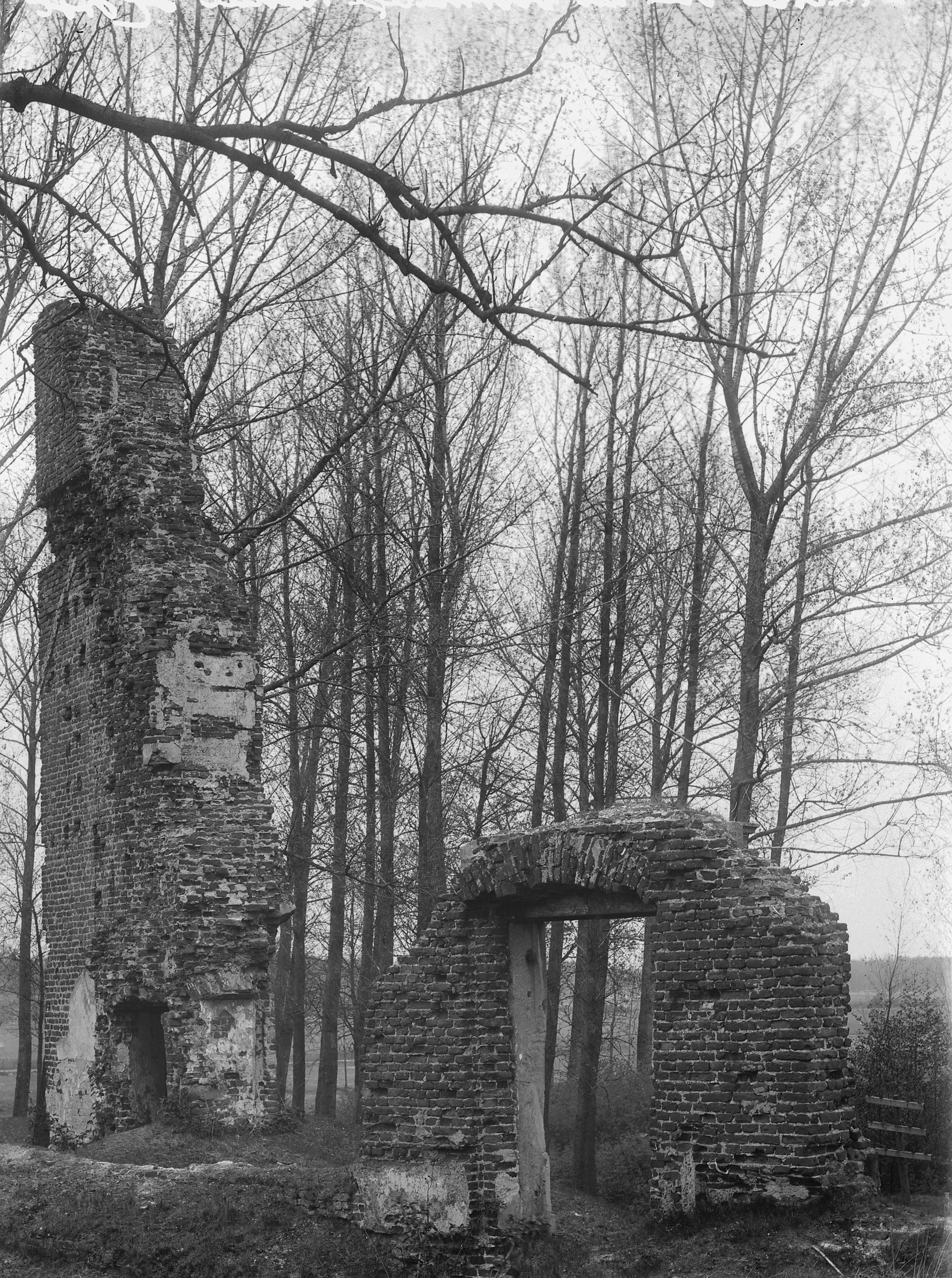 Ruine Kasteel Horst: Ruïne